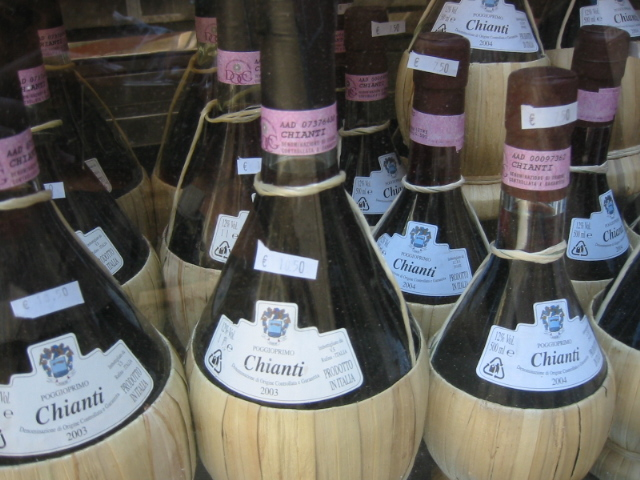 Vin Chianti